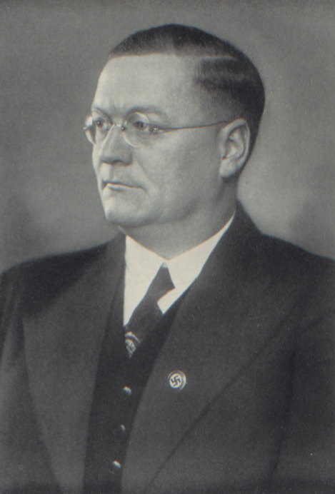 Paul Ritterbusch, Staatsrechtler, Verfassungsrechtler, zeitweilig Professor und Rektor an der CAU Kiel, später auch an der Friedrich-Wilhelms-Universität Berlin und einer der profiliertesten nationalsozialistischen Wissenschaftsfunktionäre